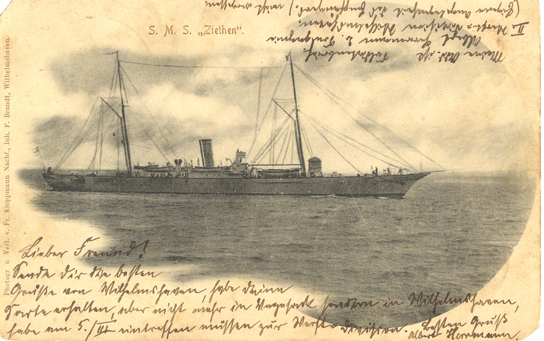 Postkarte der SMS Ziethen